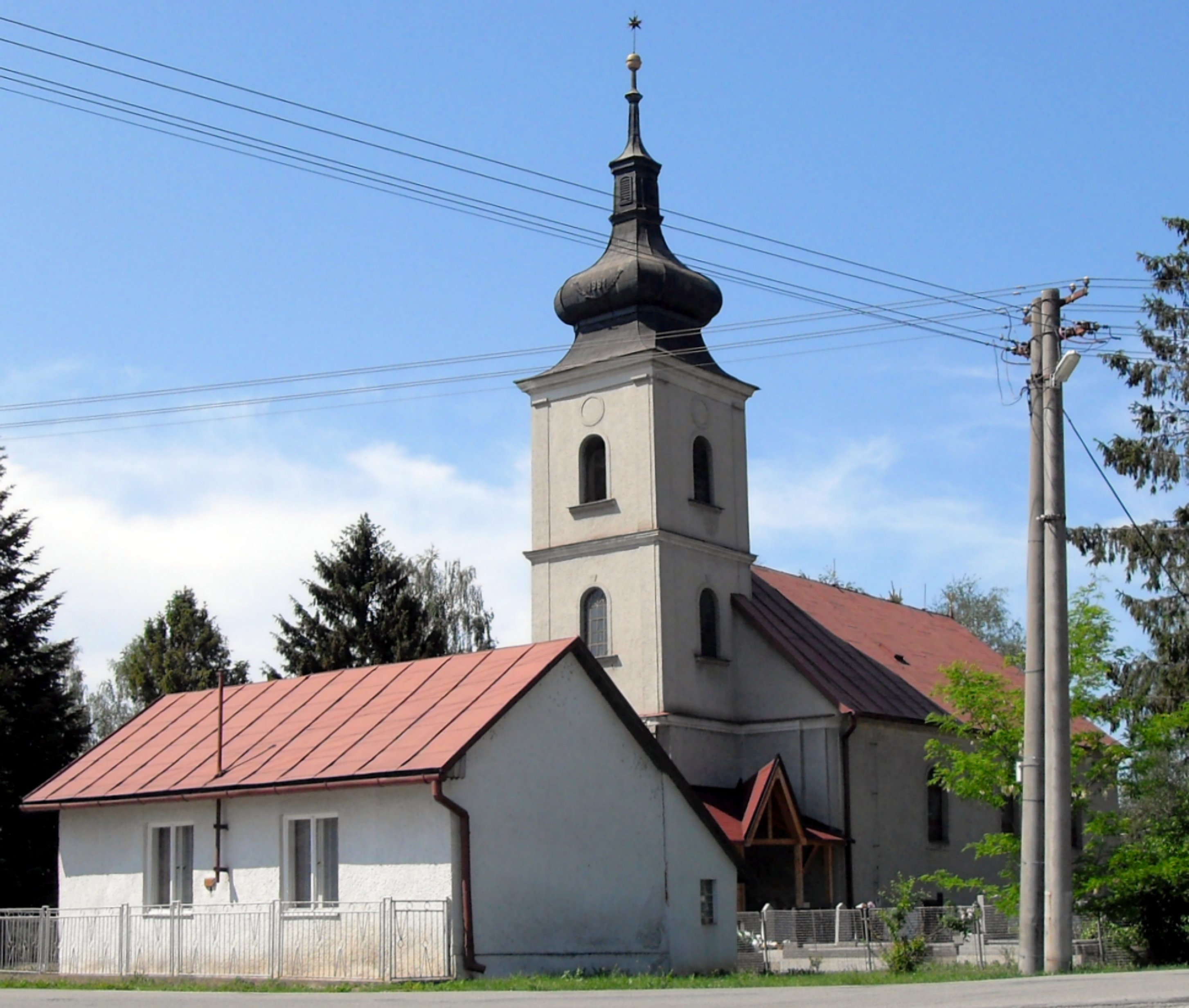 Komárovce kostol Nanebovstupenia Pana